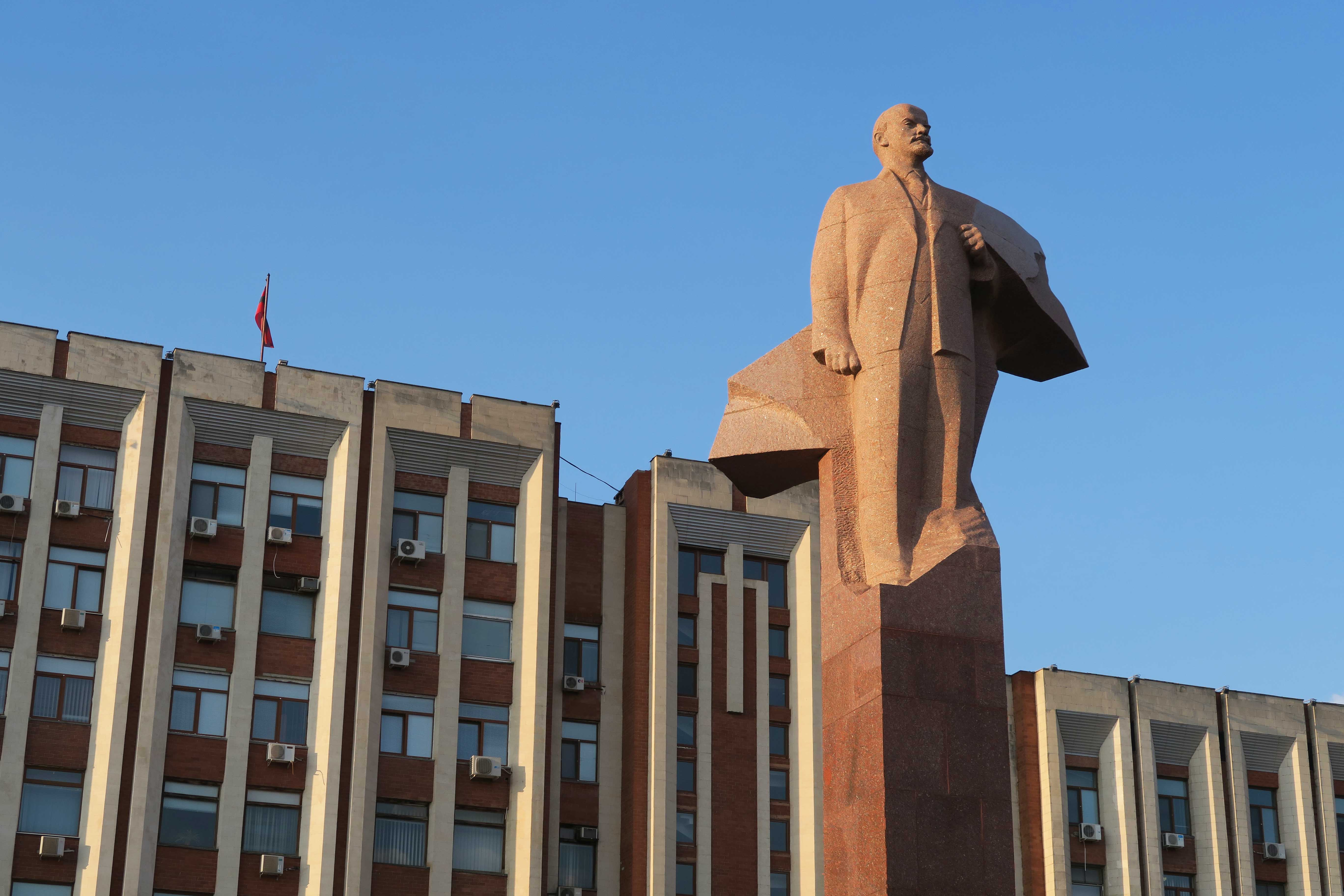 Tiraspol, Transnistria